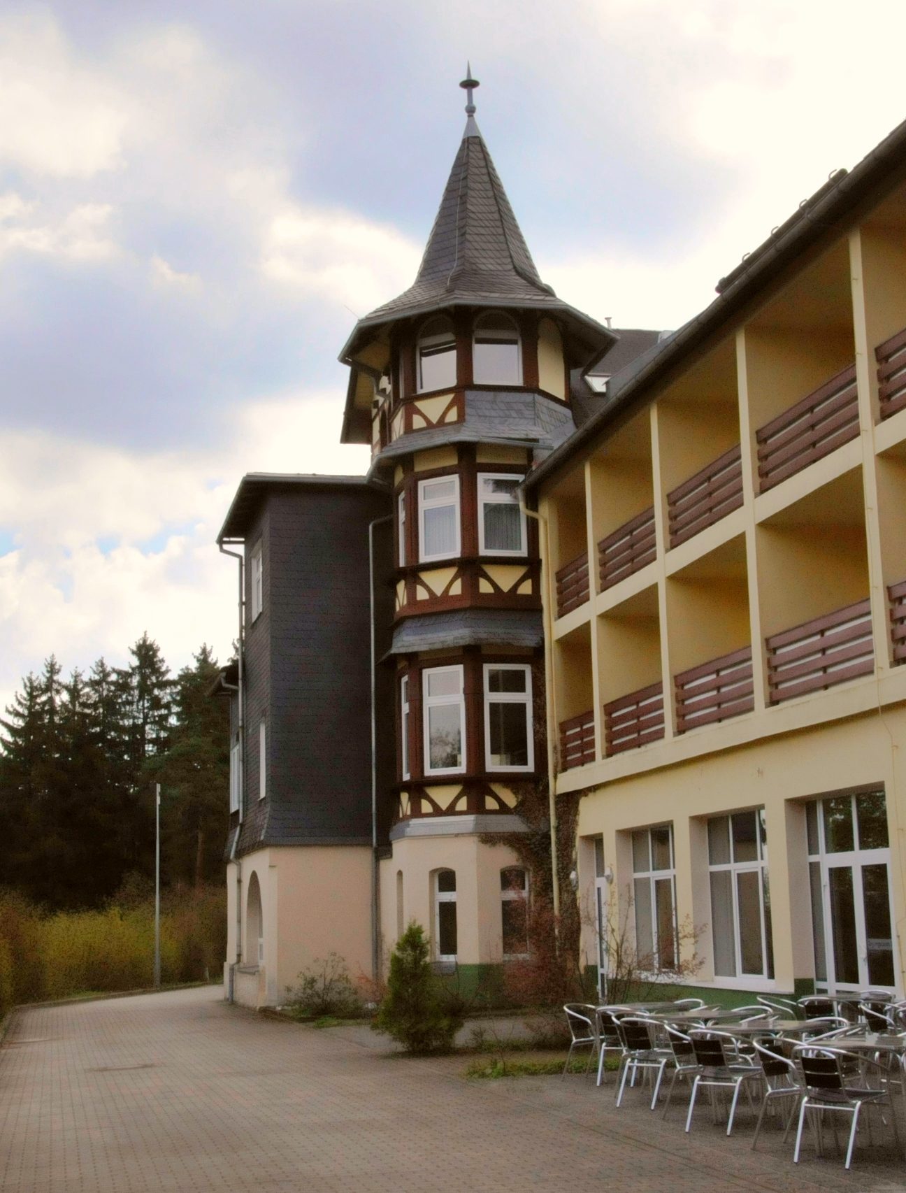 Elgersburg, Hotel am Wald, Nordseite